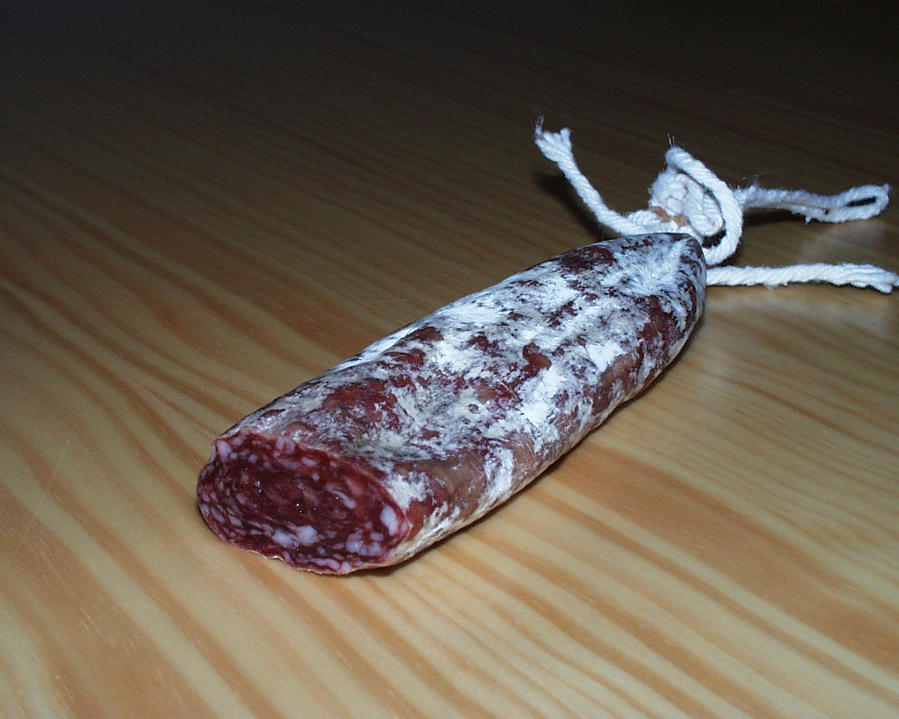 Longaniza (salchichón catalán, llonganissa de payès) Taken by myself --Ardo Beltz 17:03, 9 Apr 2005 (UTC)